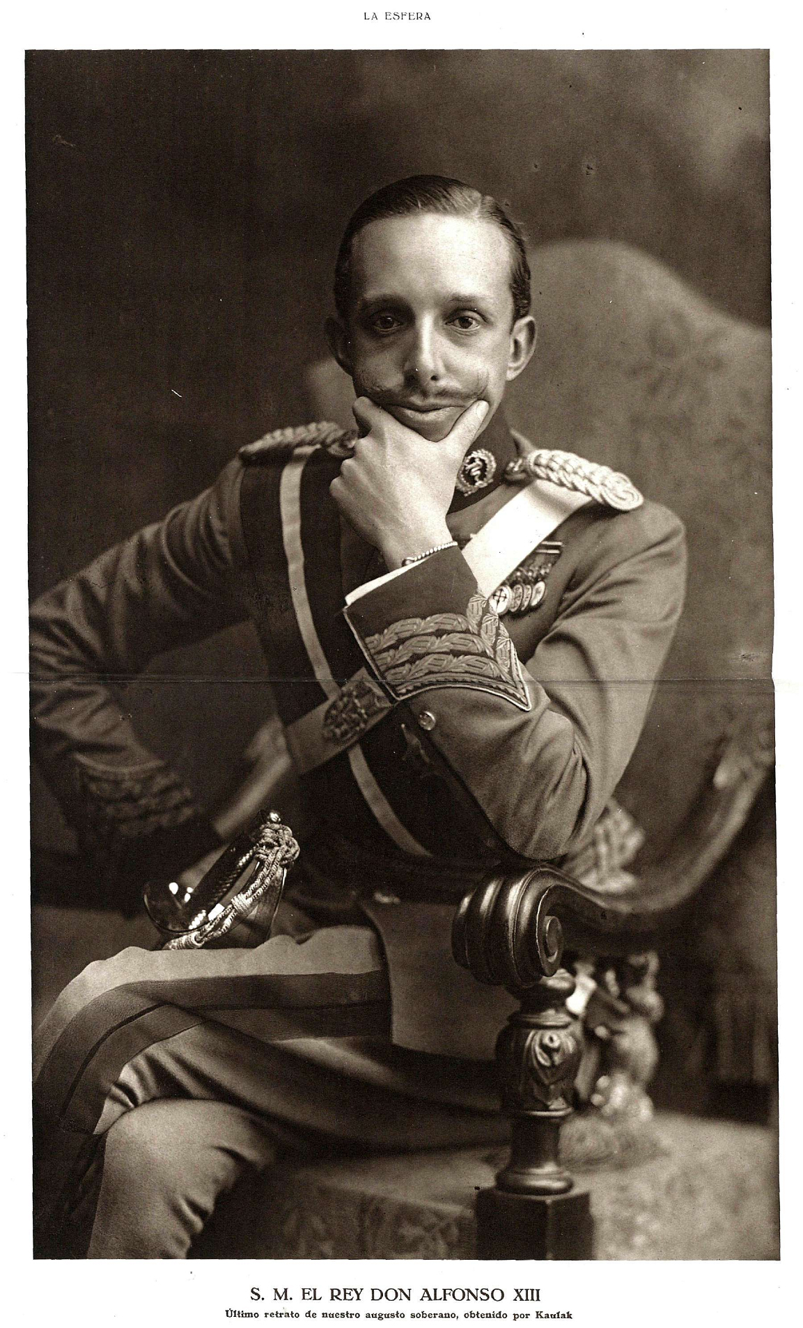 Retrato del rey Alfonso XIII, obra del fotógrafo Kaulak, recogido en la revista española La Esfera.